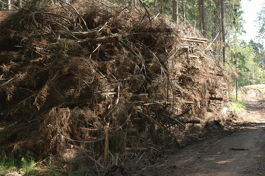 Schlagabraum zur Weiterverwertung am Abfahrtweg konzentriert (Solling, Deutschland)